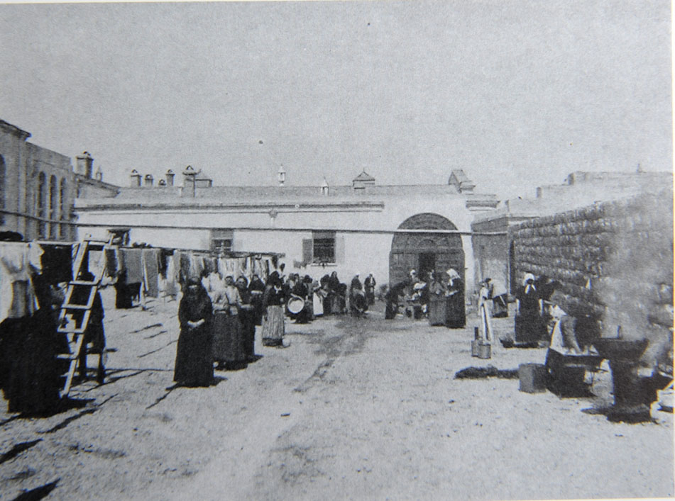 Русские православные паломницы стирают белье во дворе Мариинского подворья в Иерусалиме. Фото Ф.М. Тимон. 1907 г.